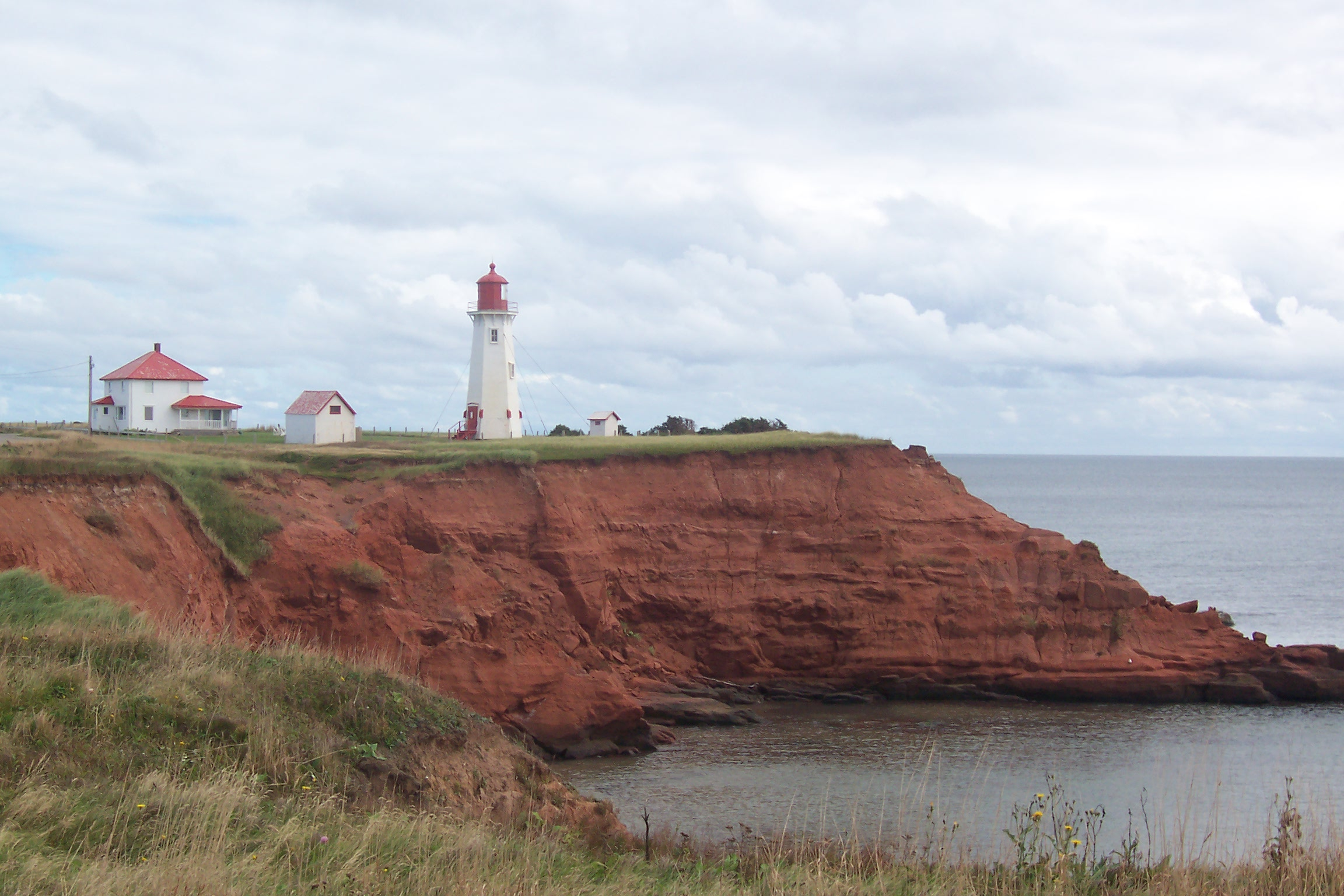 Phare situé sur la côte sud de l'Île du Havre Aubert